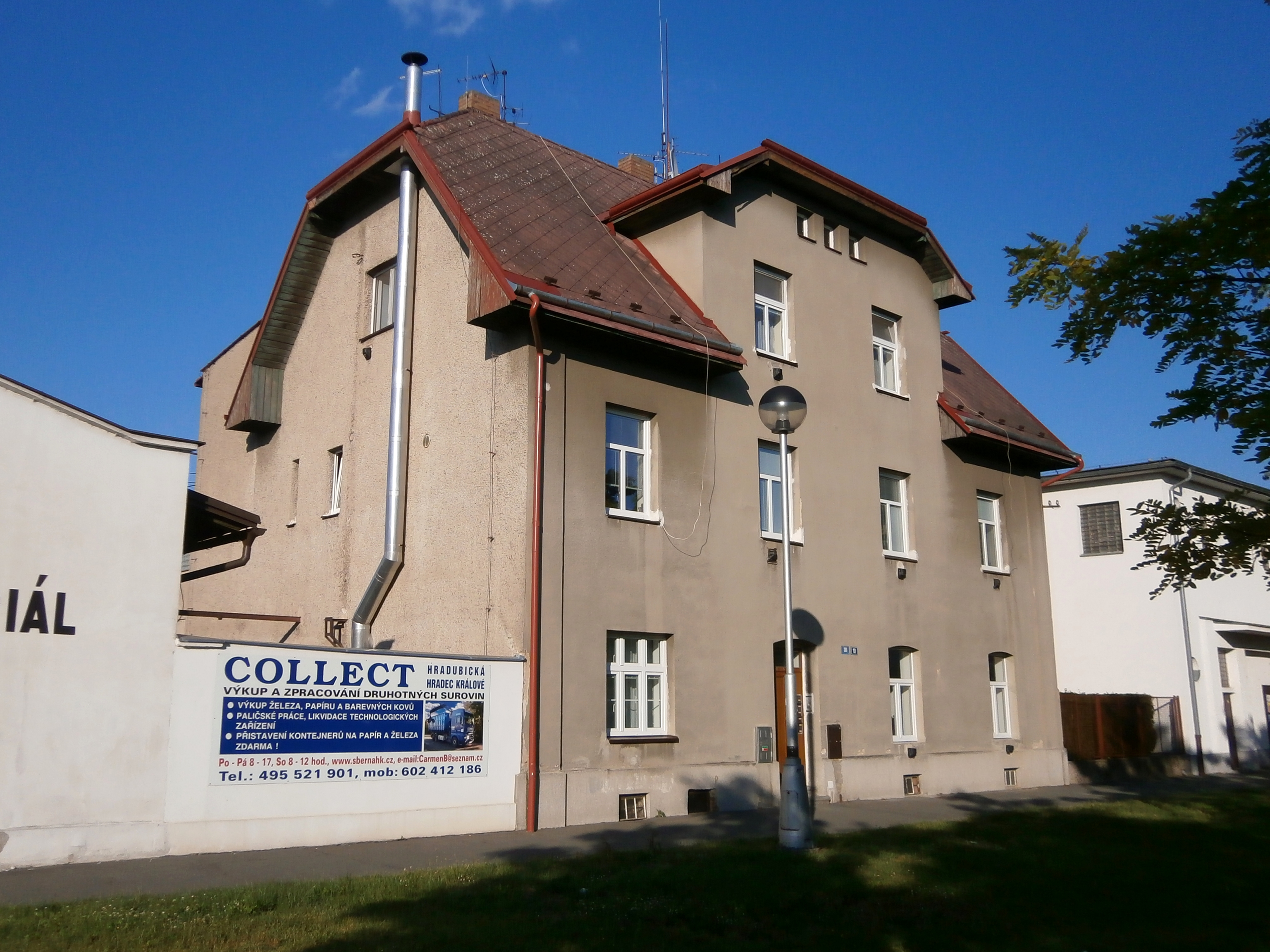 Vančurovo náměstí čp. 389 (Hradec Králové)